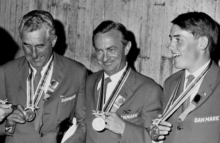 Left-right: Ole Berntsen, Christian von Bülow, Ole Poulsen